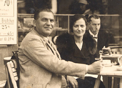 imon_Rawidowicz_at_a_Berlin_Cafe_1932 גילגמש • שיחה 07:53, 21 ינואר 2006 (UTC)